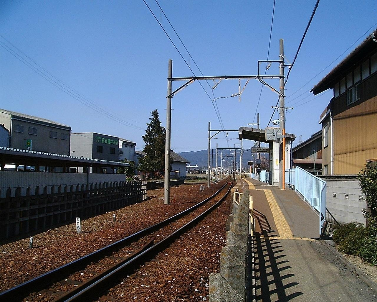 近鉄北勢線大泉東駅（三岐鉄道へ譲渡の後廃駅） ホーム